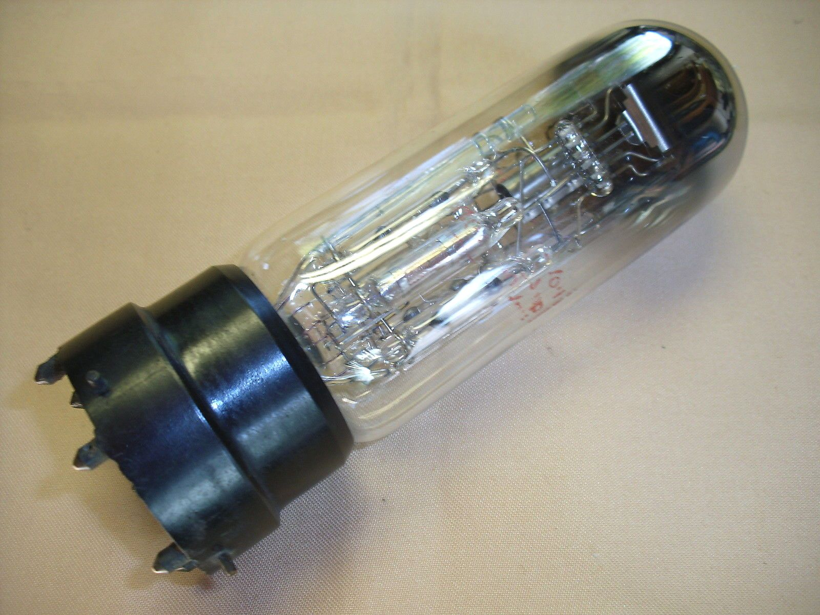 Loewe Dreifachröhre 3NF